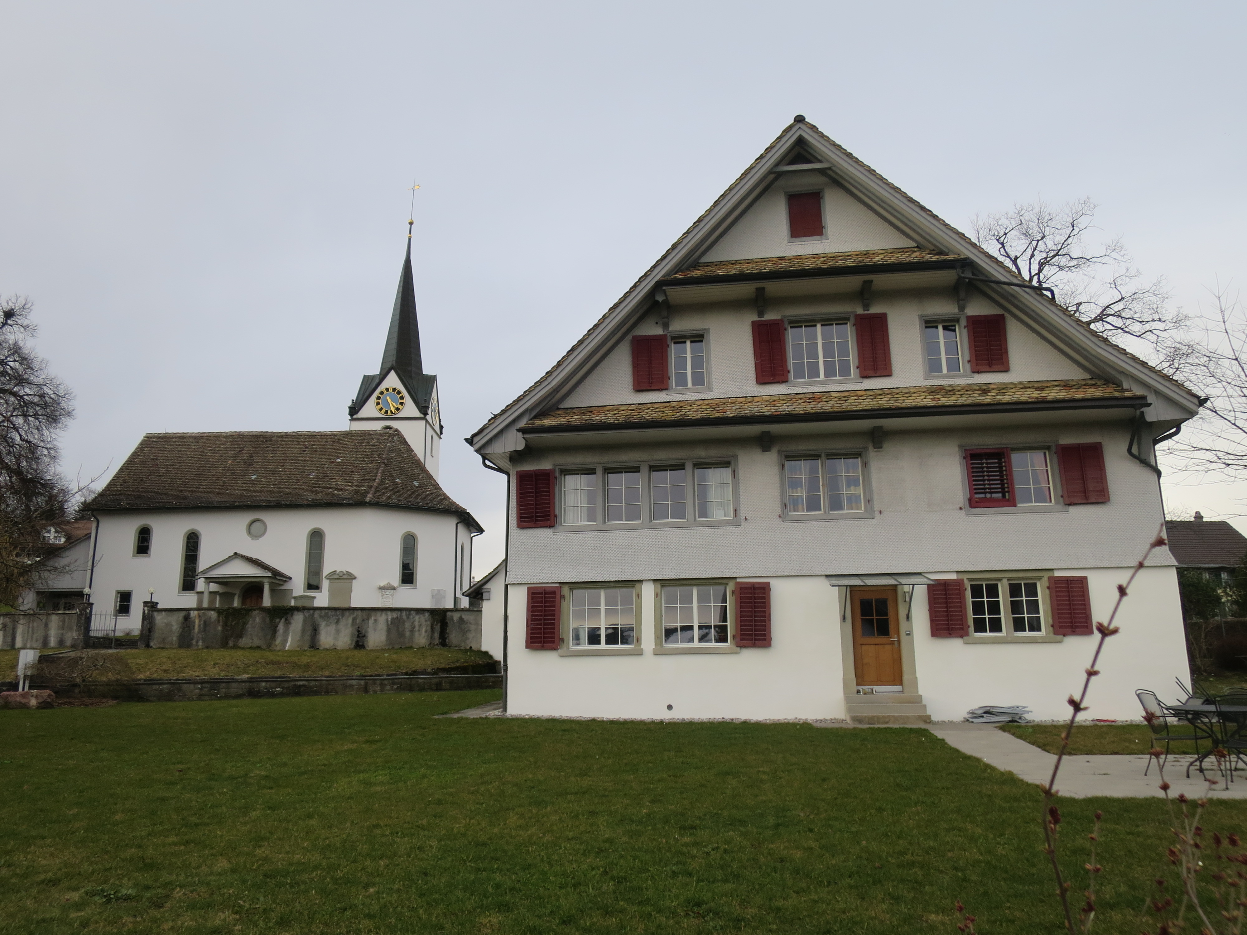 Die reformierte Kirche Hirzel mit Meta-Heusser-Geburtshaus